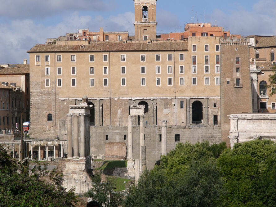 Das Bild zeigt den Senatorenpalast, der auf den Fundamenten des Tabulariums aufgebaut wurde. Die unteren Geschosse sind deutlich antiken Ursprungs.